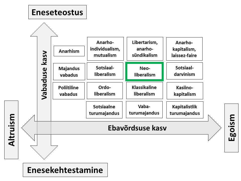 Neoliberalism sotsiaalse korra mudelis